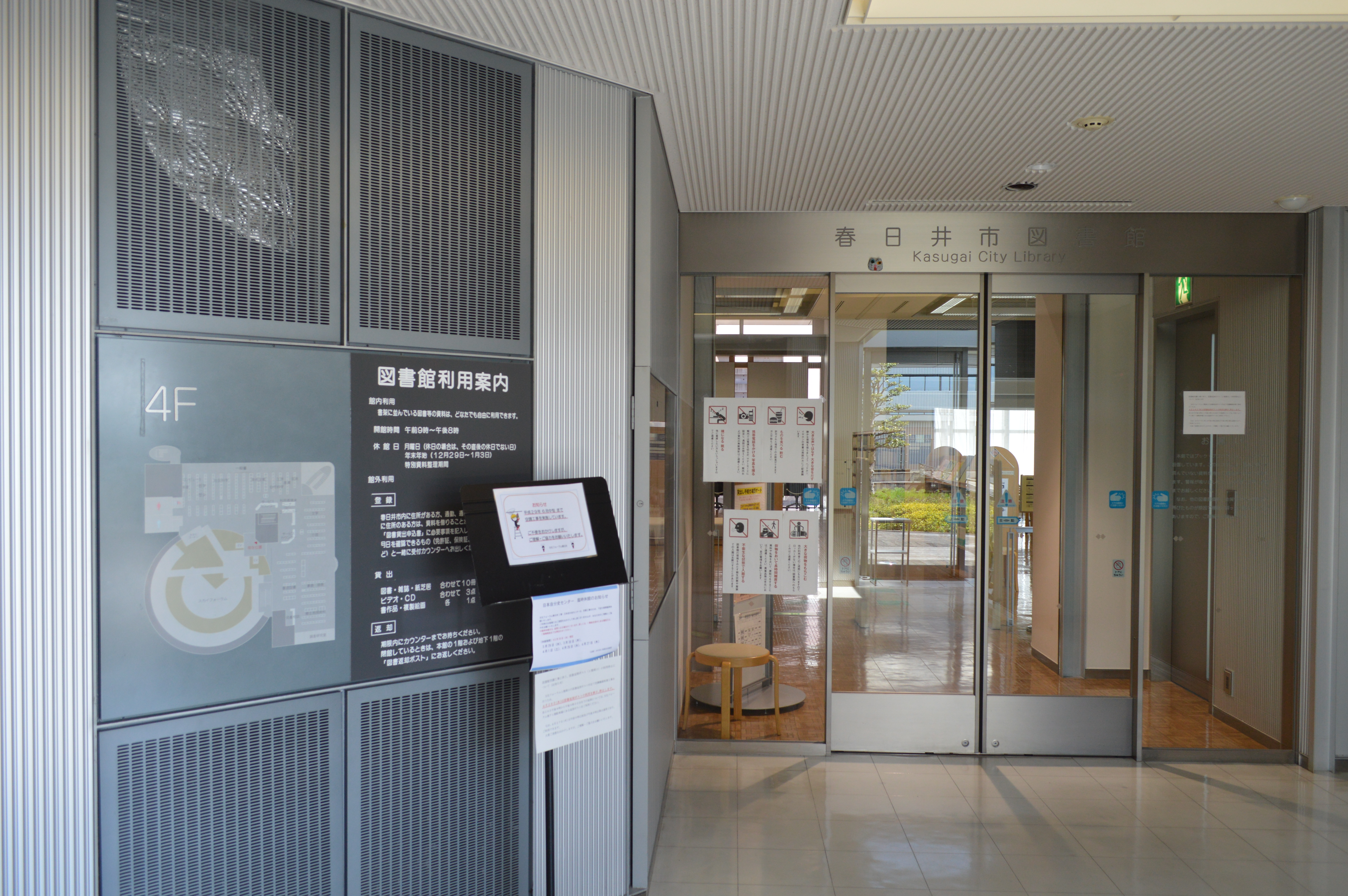 愛知県春日井市の文化フォーラム春日井。春日井市図書館の入口。